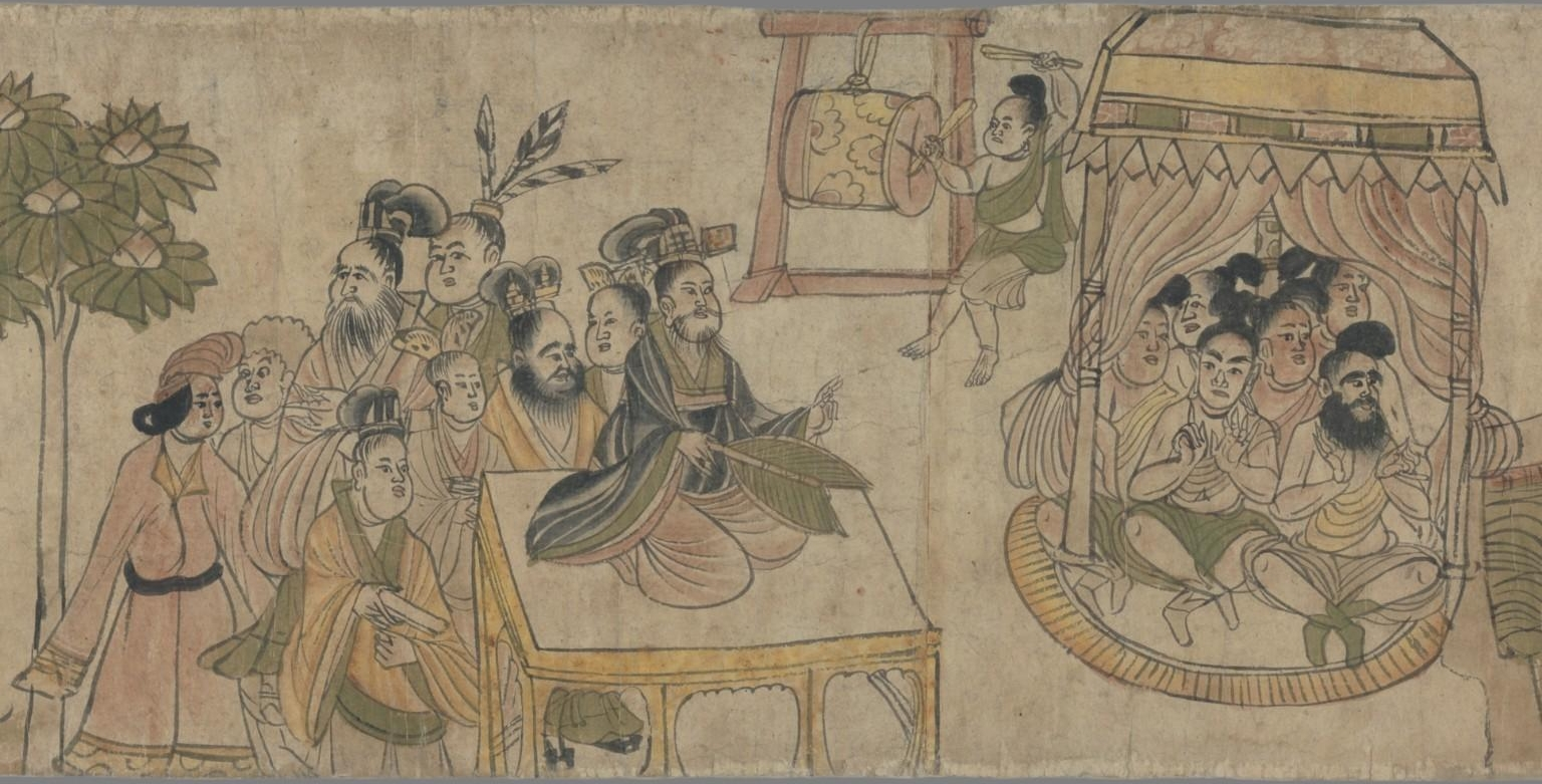 Partie du Rouleau illustré du combat magique entre Śariputra et Raudrakṣa. Voir [1]